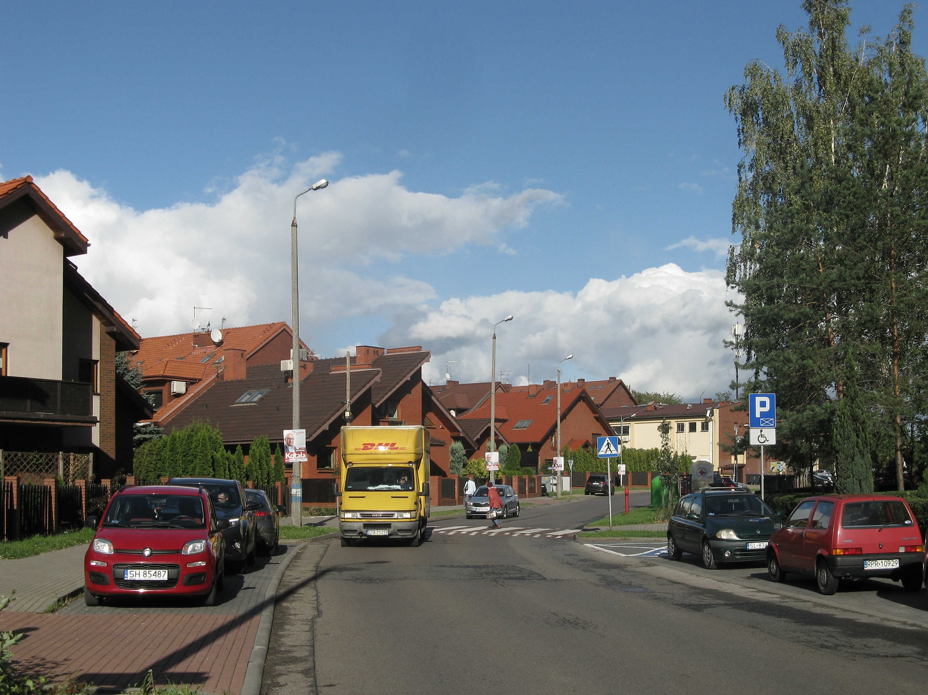 ul. Józefa Ryszki w Chorzowie, z lewej domy przy ul. Rajnholda Domina, pierwszy z lewej pod numerem 2